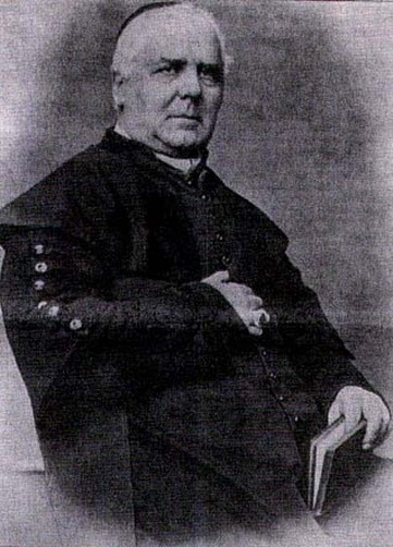 Beato Don Zefirino Agostini